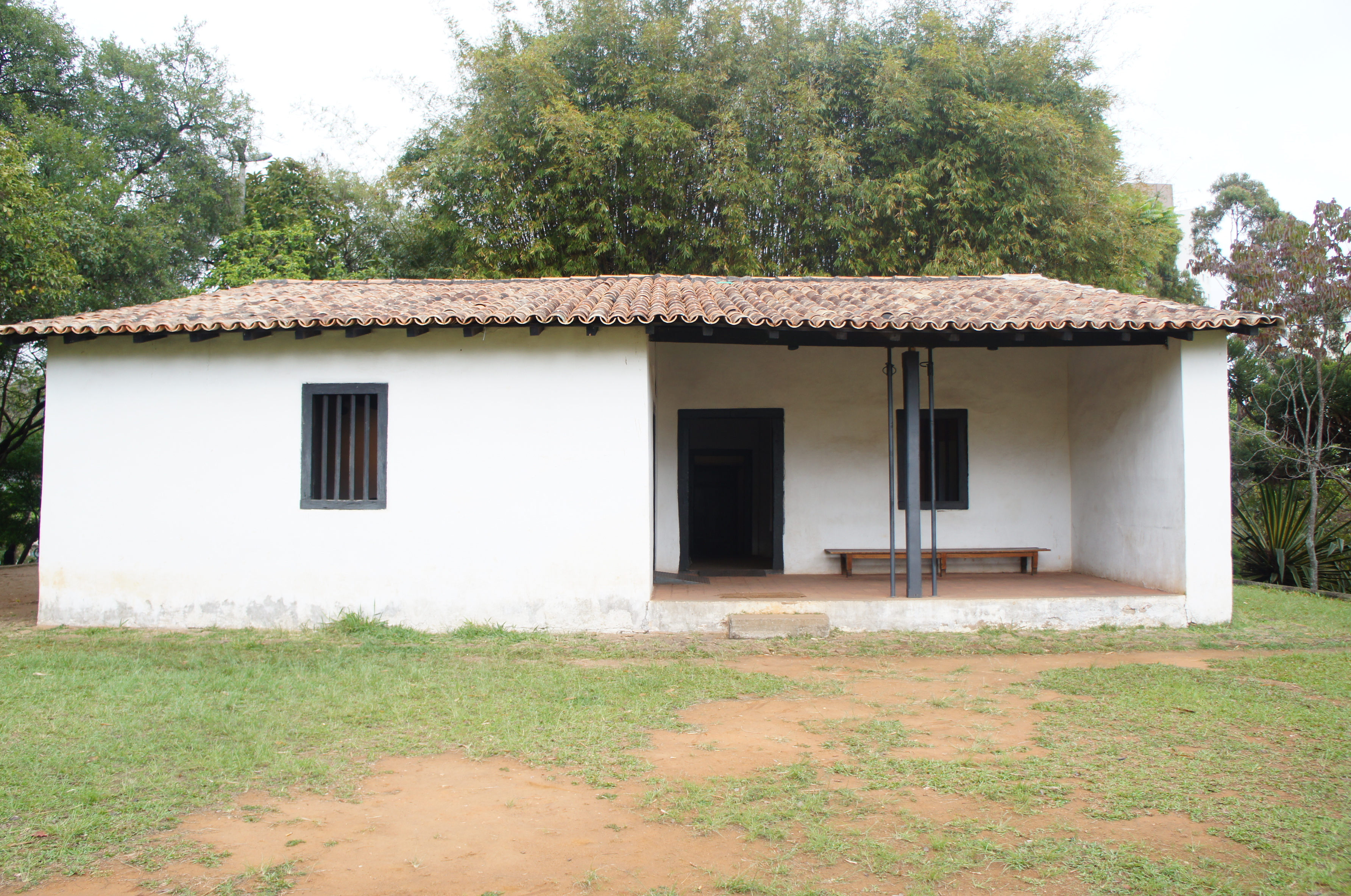 Face frontal da Casa Sítio da Ressaca, em São Paulo (SP), Brasil.